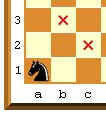 Billede skabt fra template - GNU